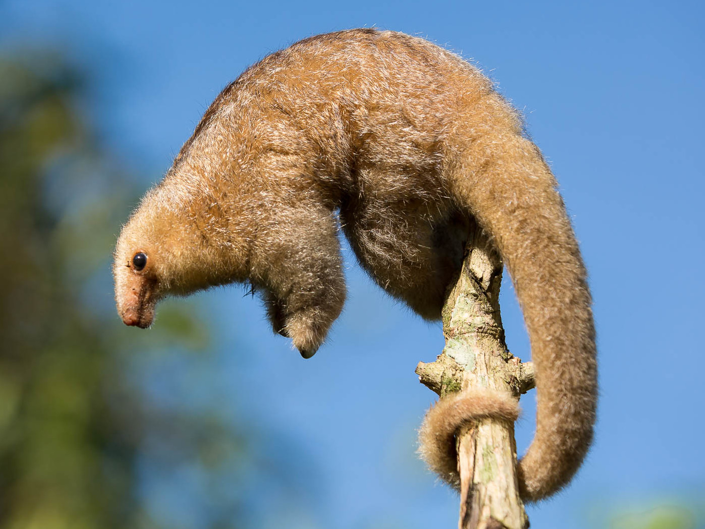 Cyclopes didactylus